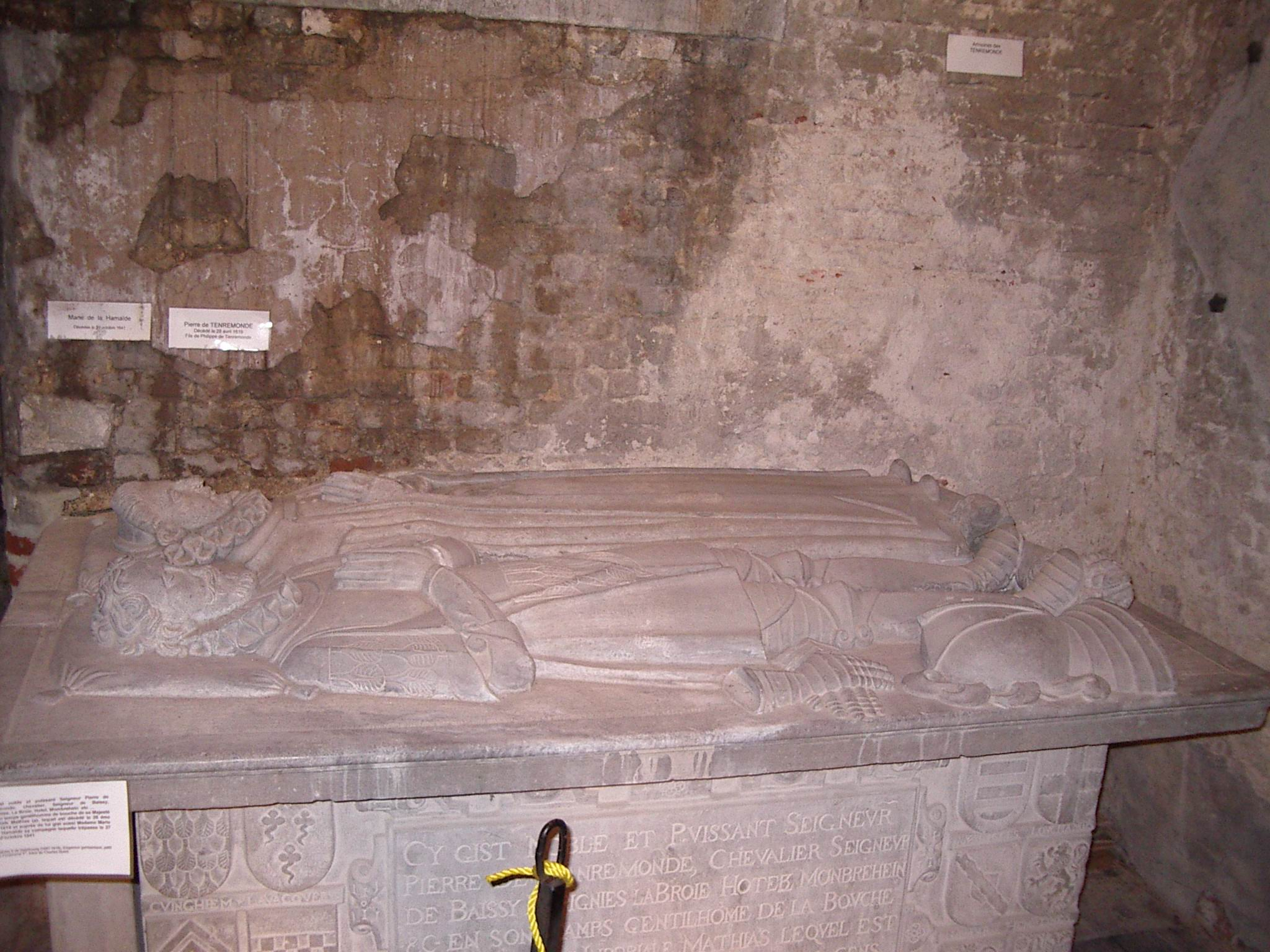 Gisants de Pierre Tenremonde et de Marie de la Hamaïde son épouse dans la chapelle de l'église de Bachy.